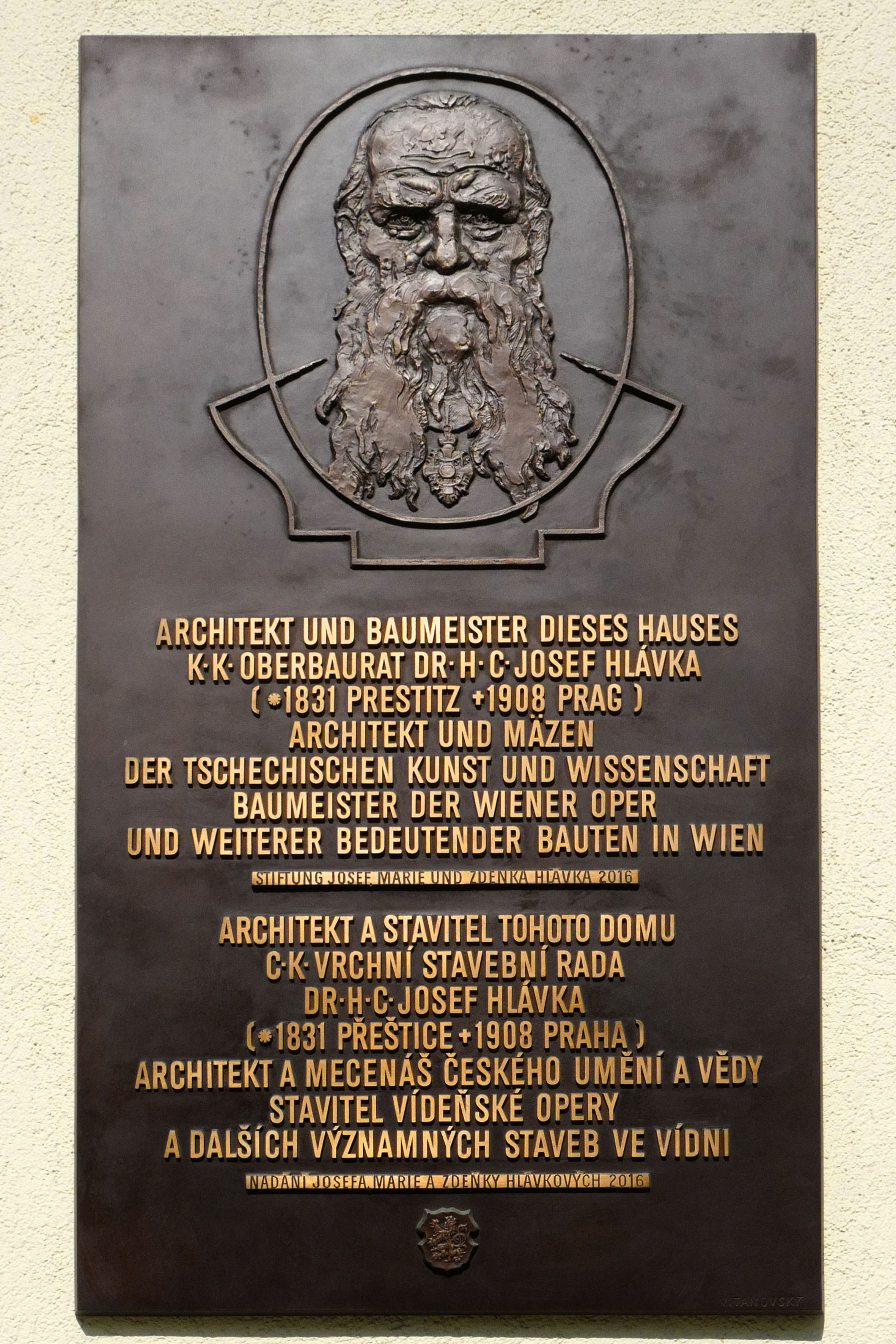 Josef Hlávka (* 15. Februar 1831 in Přeštice; † 11. März 1908 in Prag) war ein tschechischer Architekt und Baumeister.